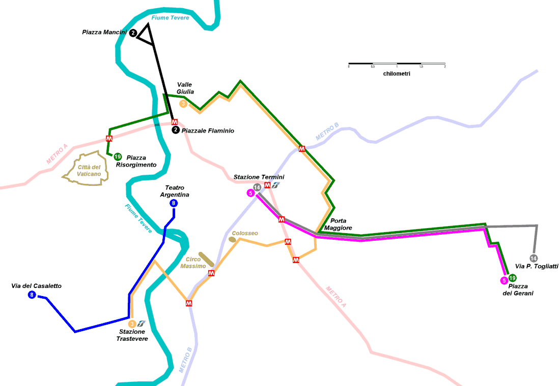 Rete tramviaria di Roma nel 2007